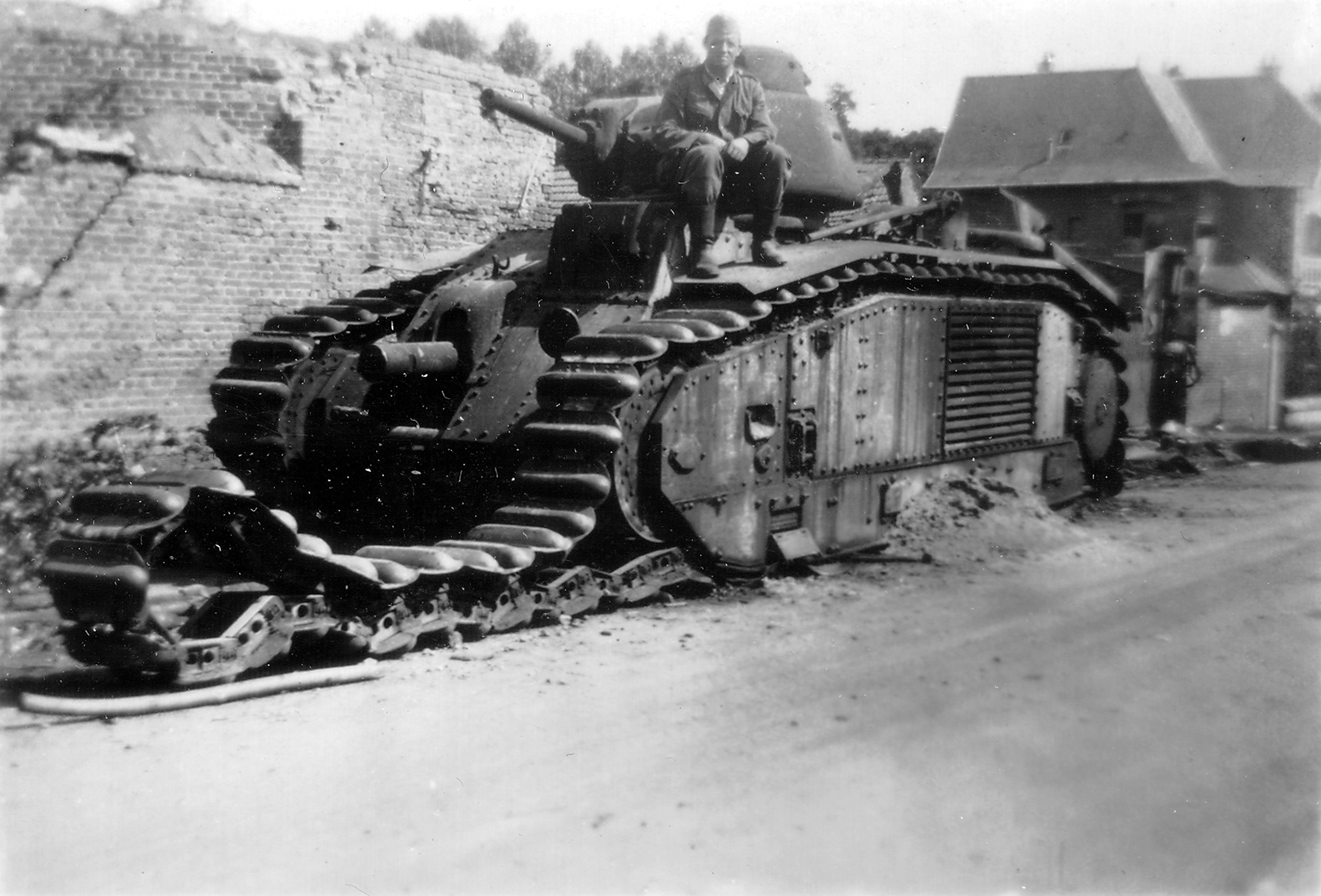 Photographie allemande -(col. Normandie Mémoire) Un soldat allemand pose fièrement assis sur un char Renault B1bis déchenillé à gauche. Ce char est visible sur la p003072 : [1] File:P003072 B1 bis Senegal in Saint-Simon, Aisne, May 1940 (5407522168).jpg Char Renault B1bis N° 209 nommé SENEGAL appartenant au 15ème BCC, 1ère section de la 1ère Compagnie ; détruit par arme antichar Ie 19 mai 1940. Selon [2] De nos jours : [3]